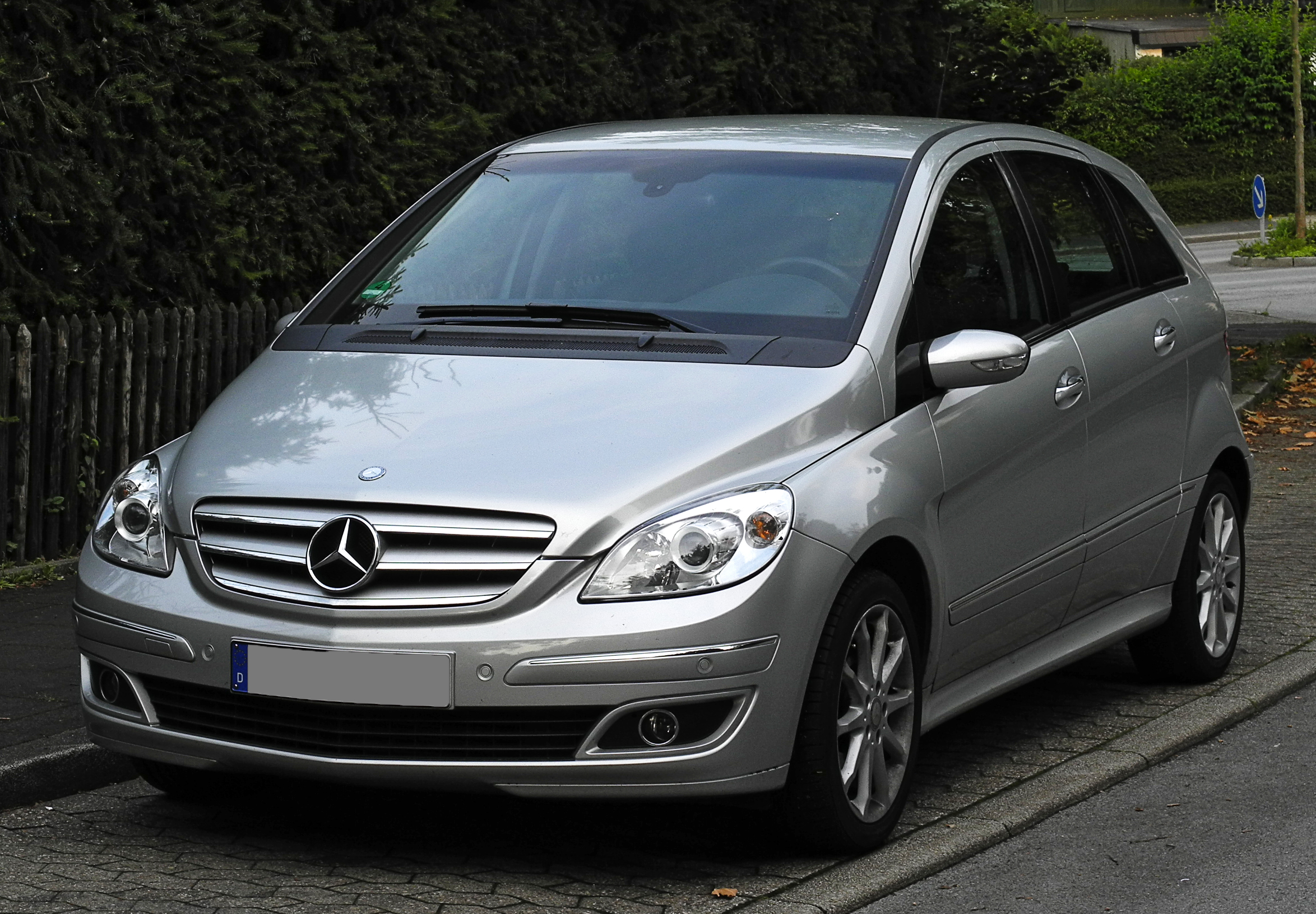 Mercedes-Benz B 180 CDI (T 245)